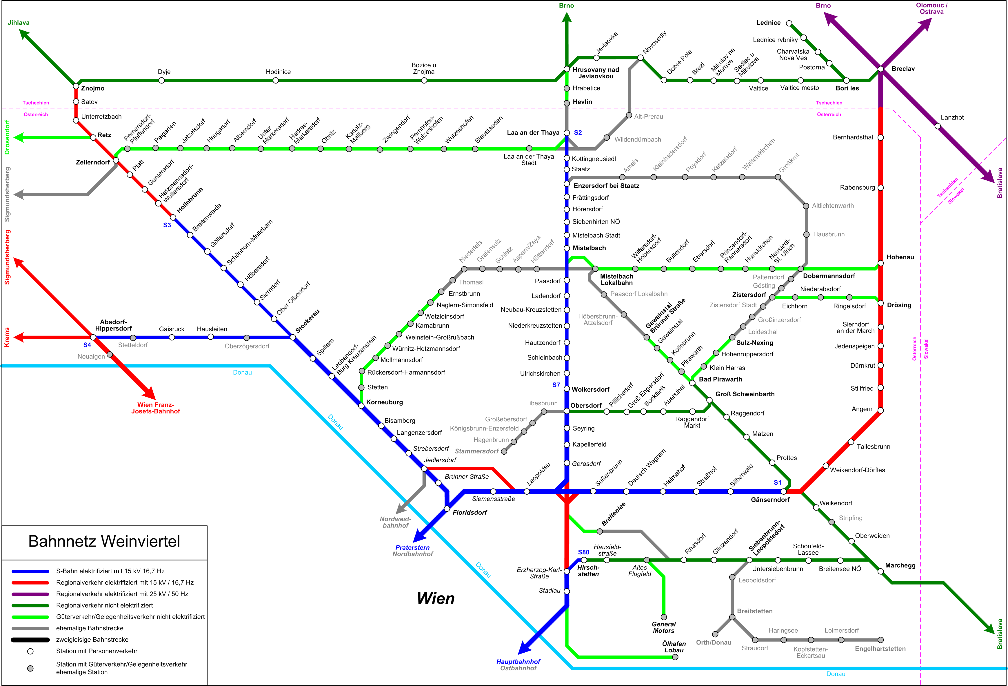 Bahnnetz im Weinviertel Stationen in Wien in kursiv